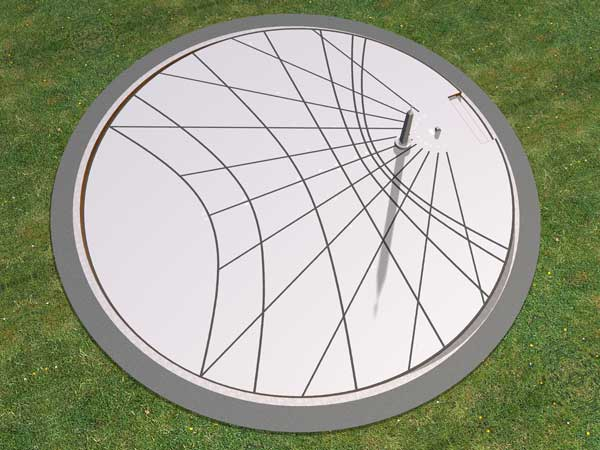 Computermodell der großen Horizontalsonnenuhr auf der Halde Hoheward